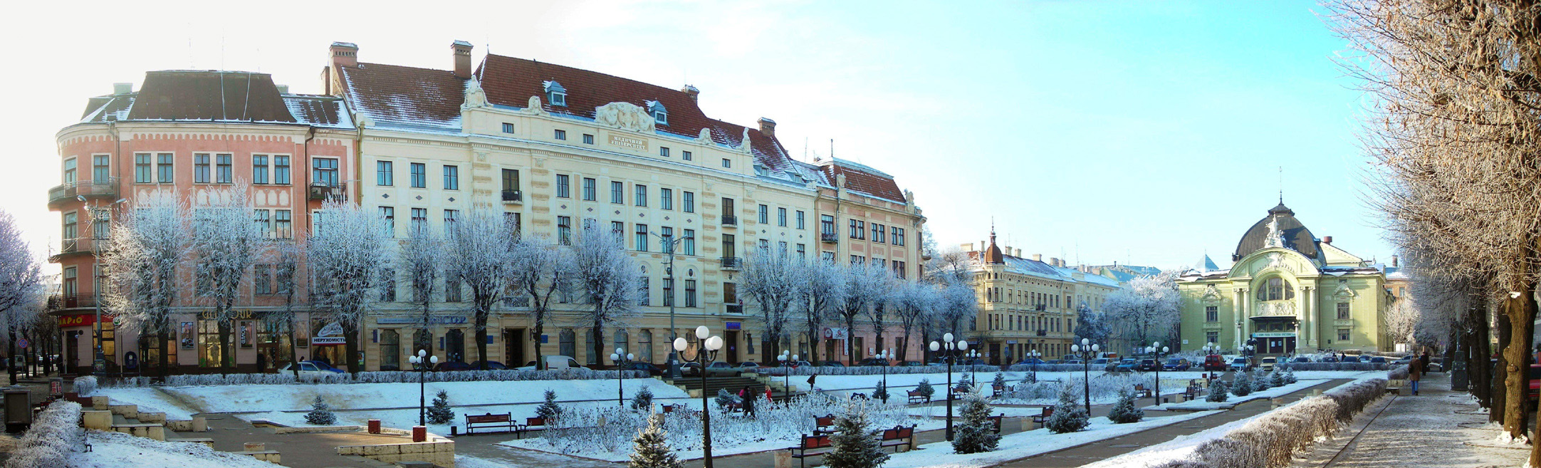 Театральная площадь Черновцов